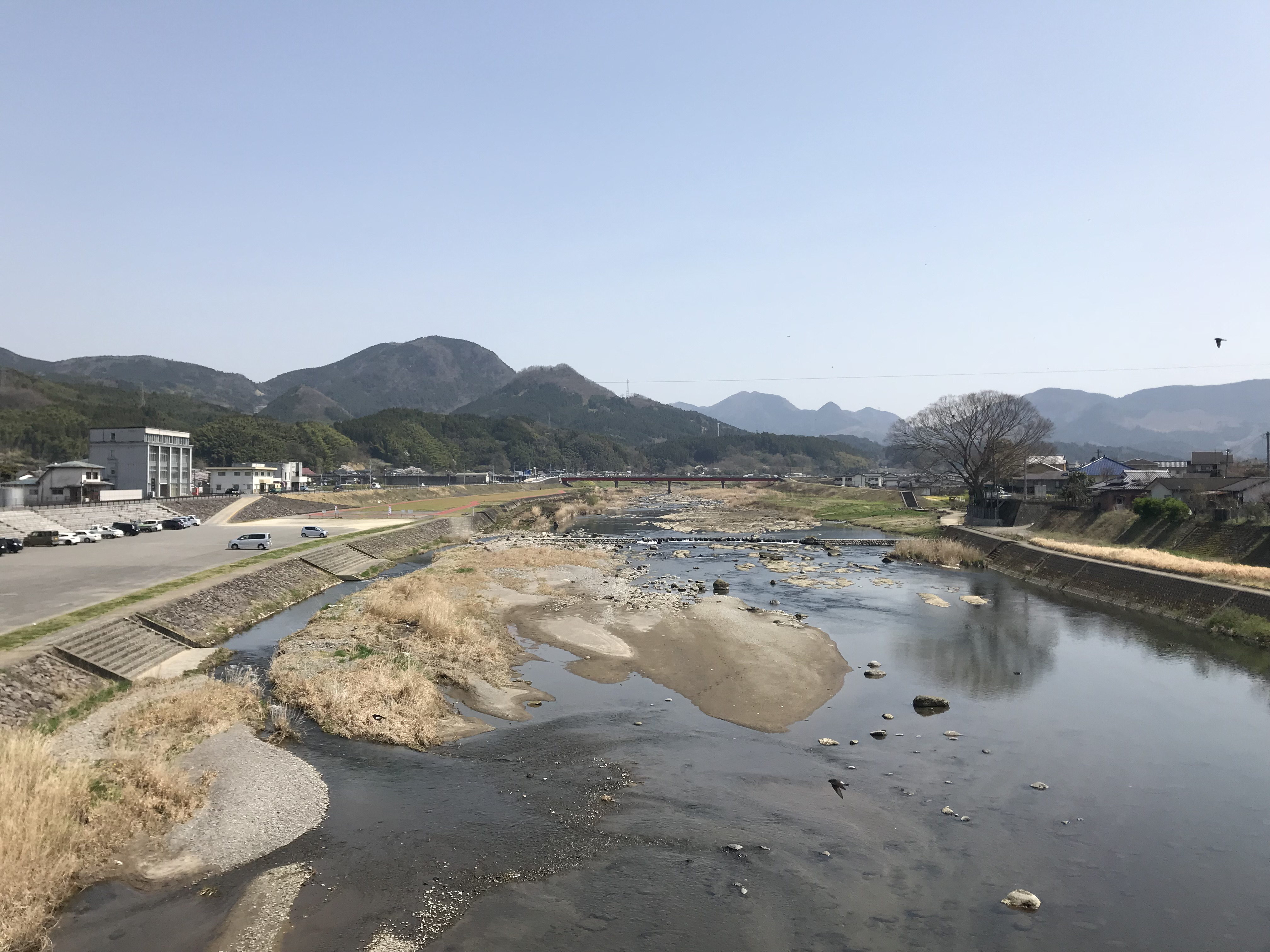 協心橋より望む玖珠川(上流側)